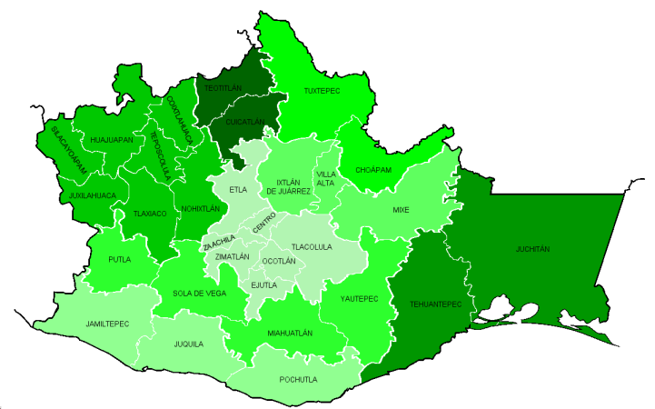 División distrital de Oaxaca